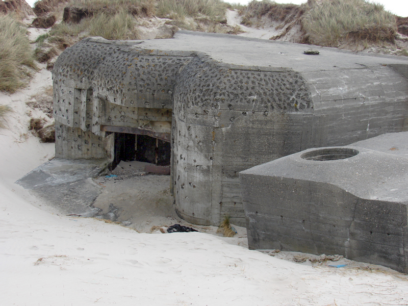 Skytsbunker ved HKB 7/180. Blåvands Huk